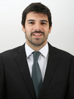 Joaquín José Lavín León, político chileno.